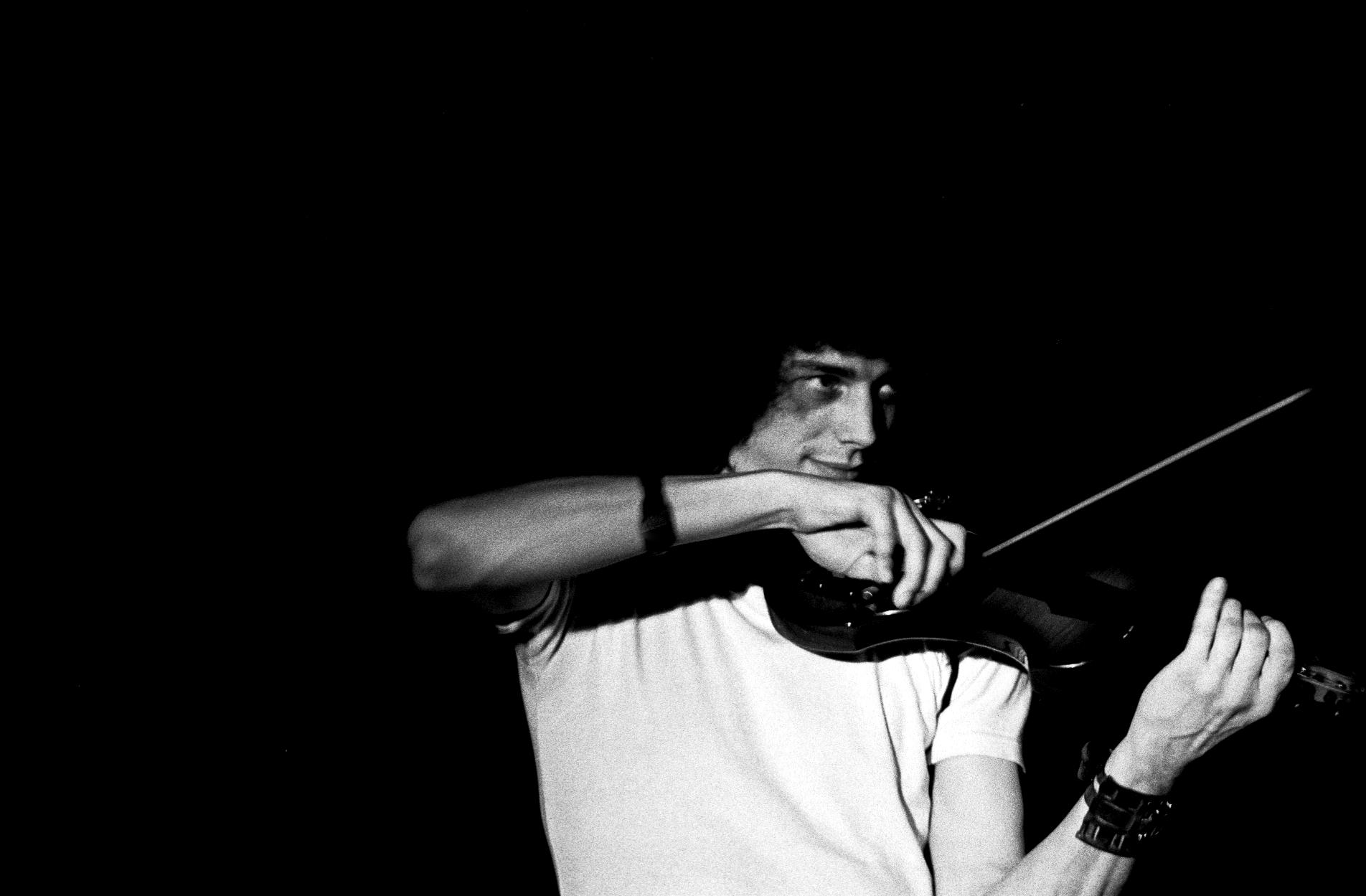 Udo Lindenbergs Panik-Orchester in der Musikhalle Hamburg, 1974. Hier: Lonzo Westphal Copyright Heinrich Klaffs